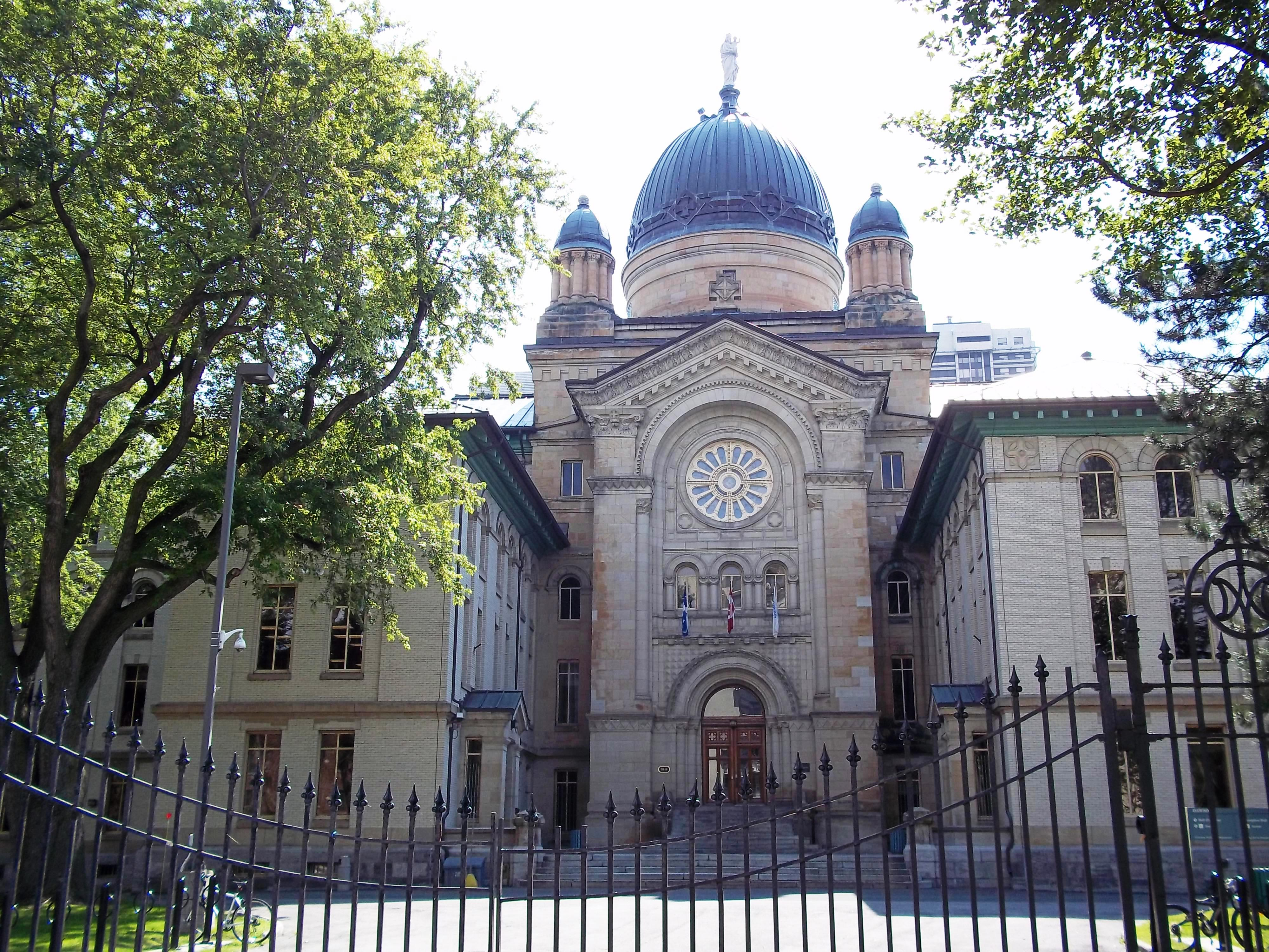 Collège Dawson, Montréal